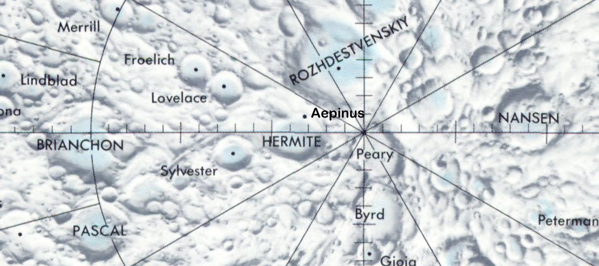 Cráter lunar Aepinus. Localización. (Lunar Chart LPC1. Second Edition)